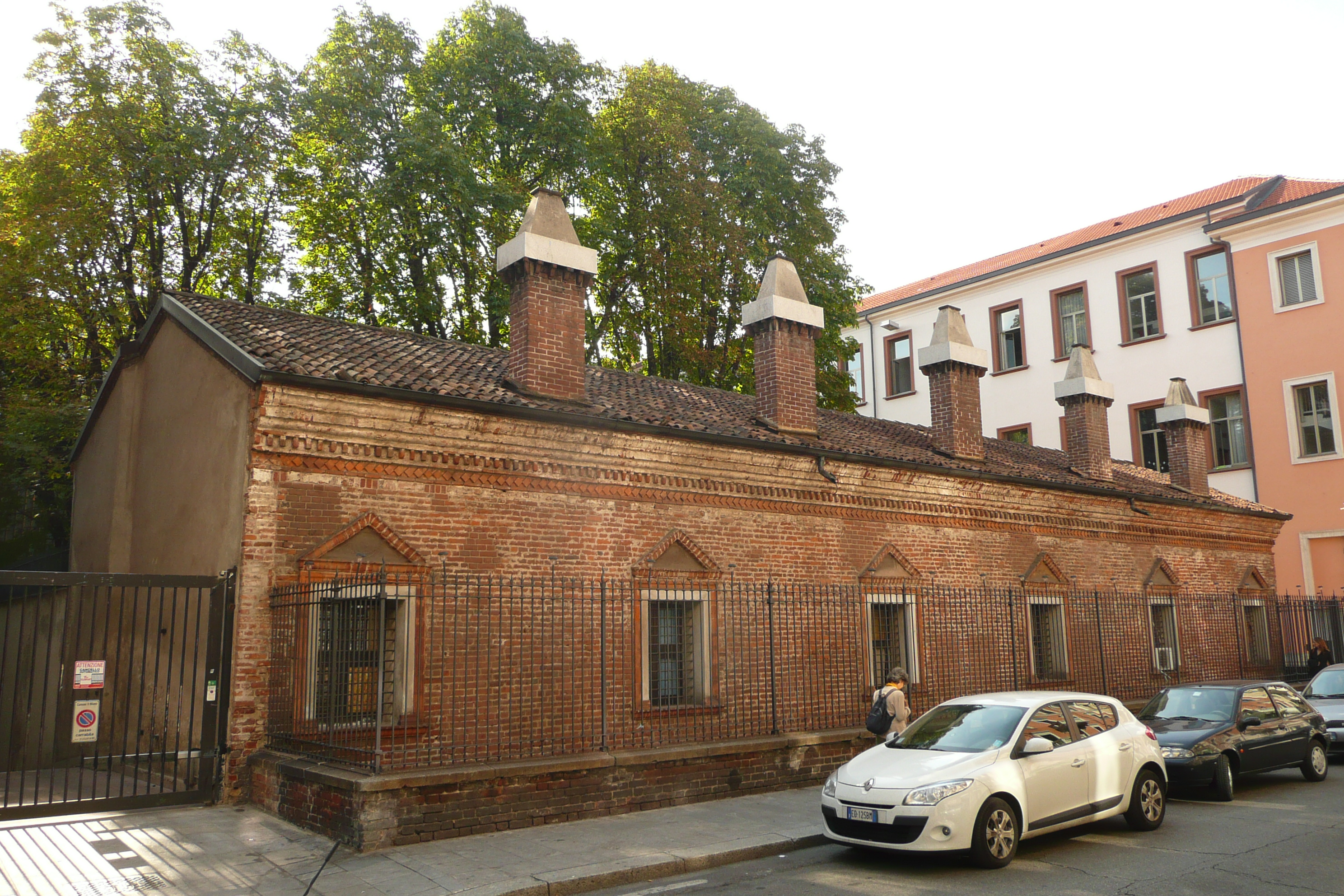 porzione superstite del Lazzaretto di Milano, edificato a partire dal 1488 in cotto lombardo